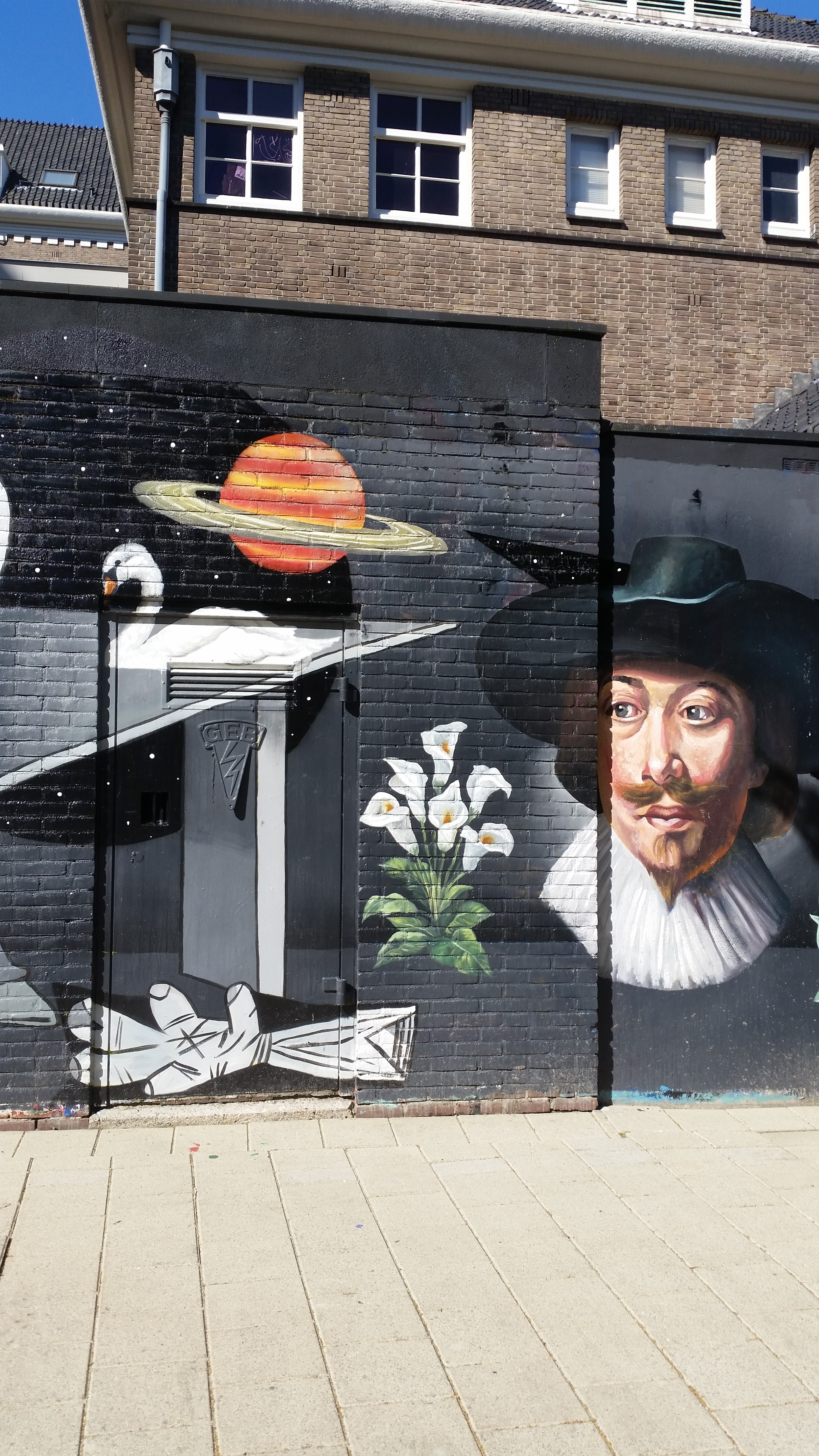 Portret van Constantijn Huygens in Huygenika, Tweede Constantijn Huygensstraat, Amsterdam